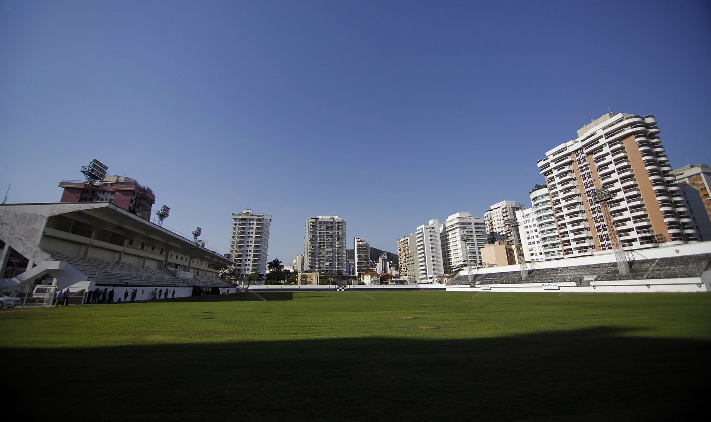 Vista do campo de futebol do Estádio Caio Martins, Niterói-RJ.